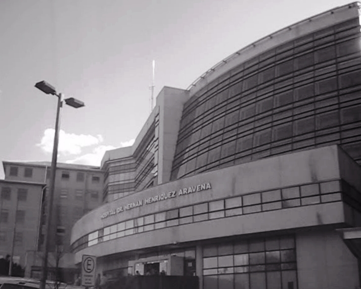 Hospital Doctor Hernán Henríquez Aravena de Temuco, Chile.